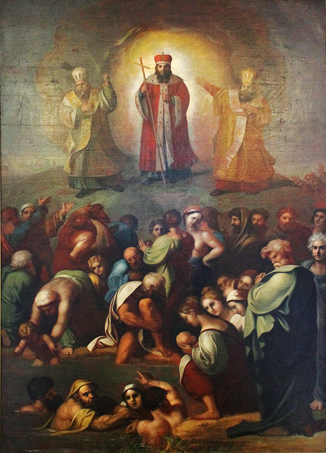 Сальватор Тончи (1756-1844 гг.). Крещение владимирцев при святом князе Владимире 1813 г. Холст, масло